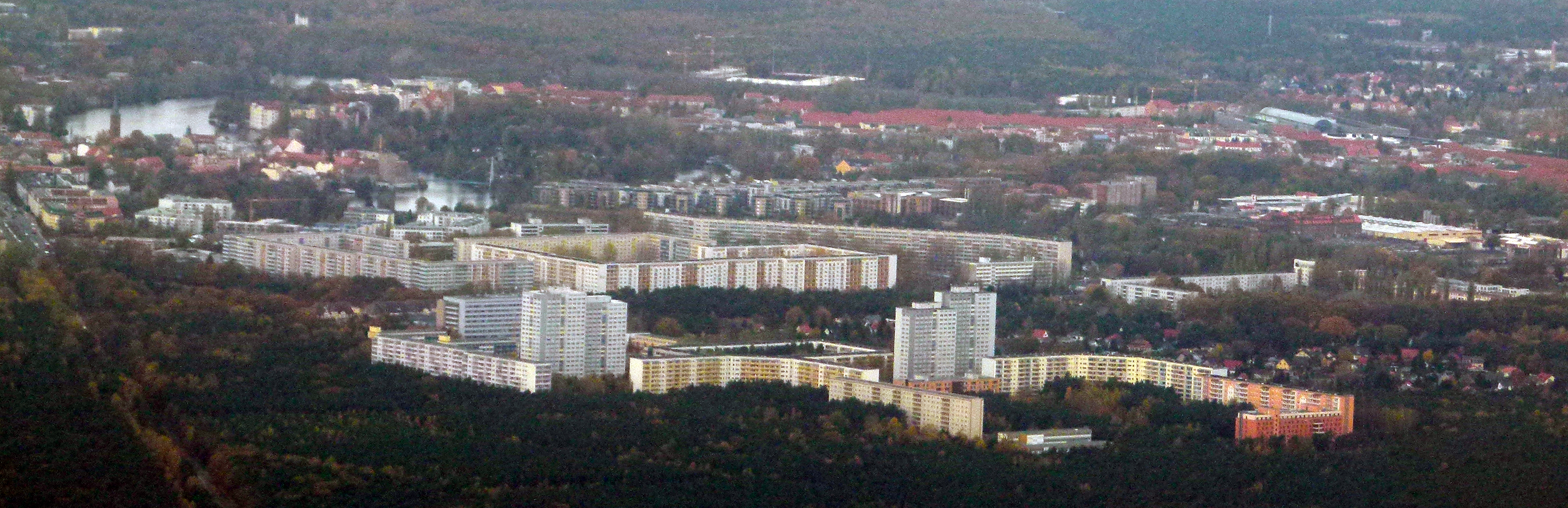 Blick auf das Salvador-Allende-Viertel in Berlin-Köpenick